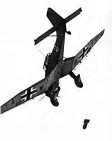 Фотографије бомбардованог Београда 06. 04. 1941. и улазак окупатора у Београд априла 1941.